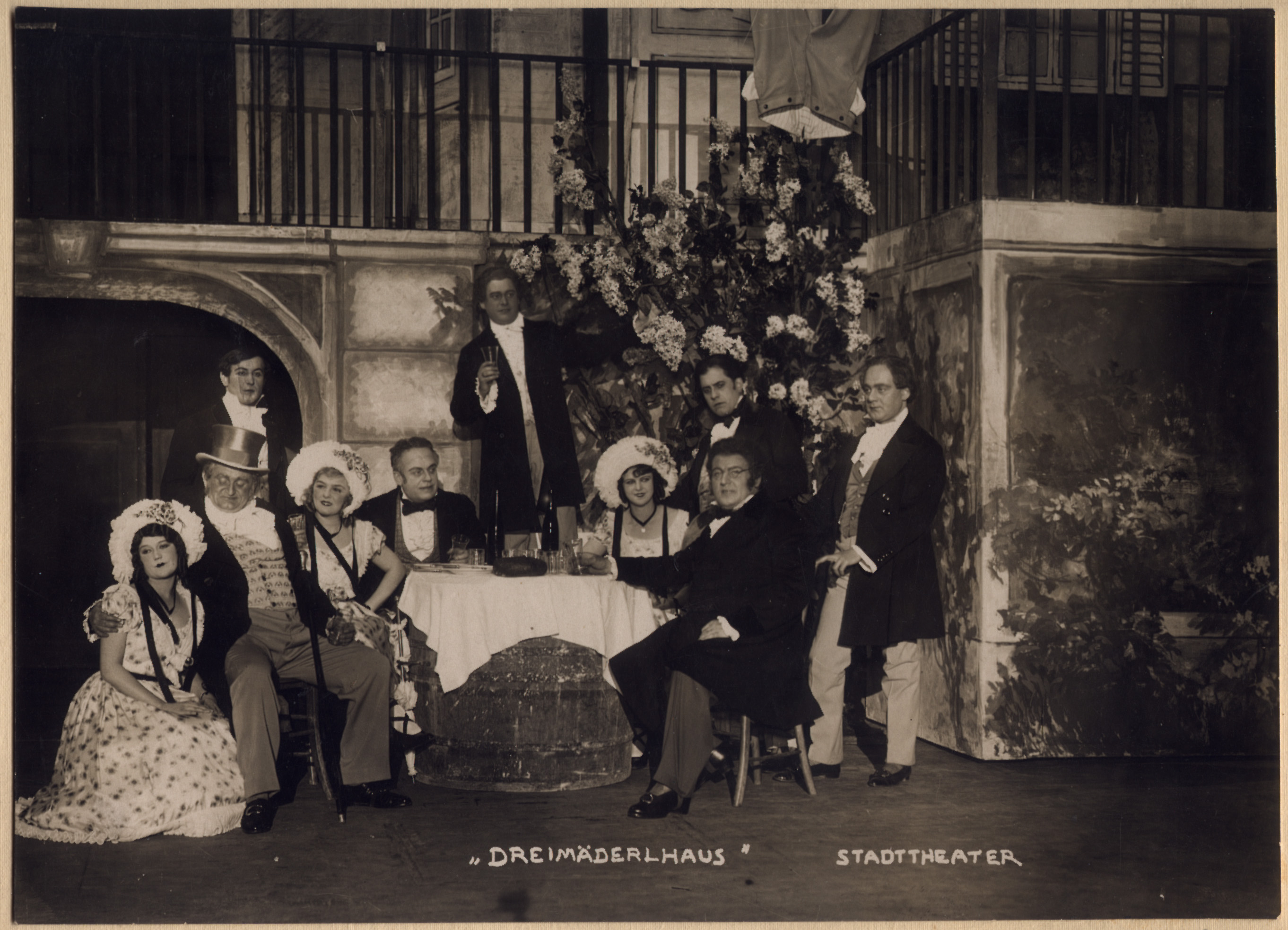 "Das Dreimäderlhaus" Bühnenfoto Stadttheater Wien 1928 mit Alfred Piccaver, Felix Dombrowsky, Hans Hawel, Artur Reichmann u.v.m.